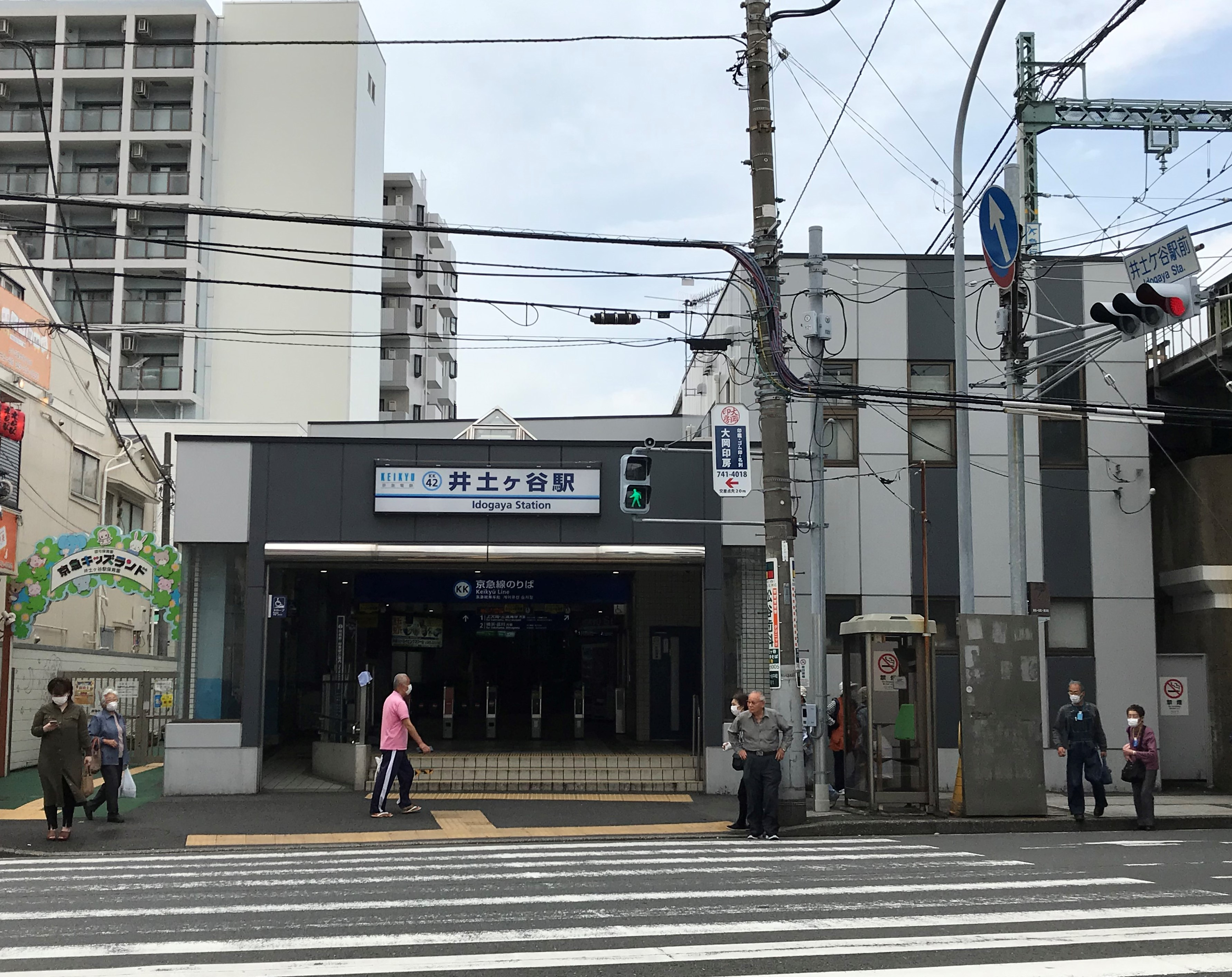 井土ヶ谷駅